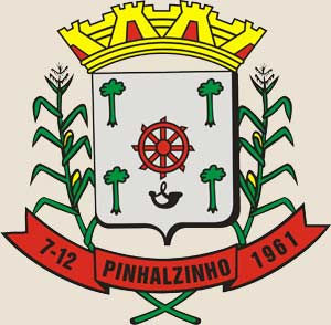 Blason de la municipalité de Pinhalzinho - Brésil